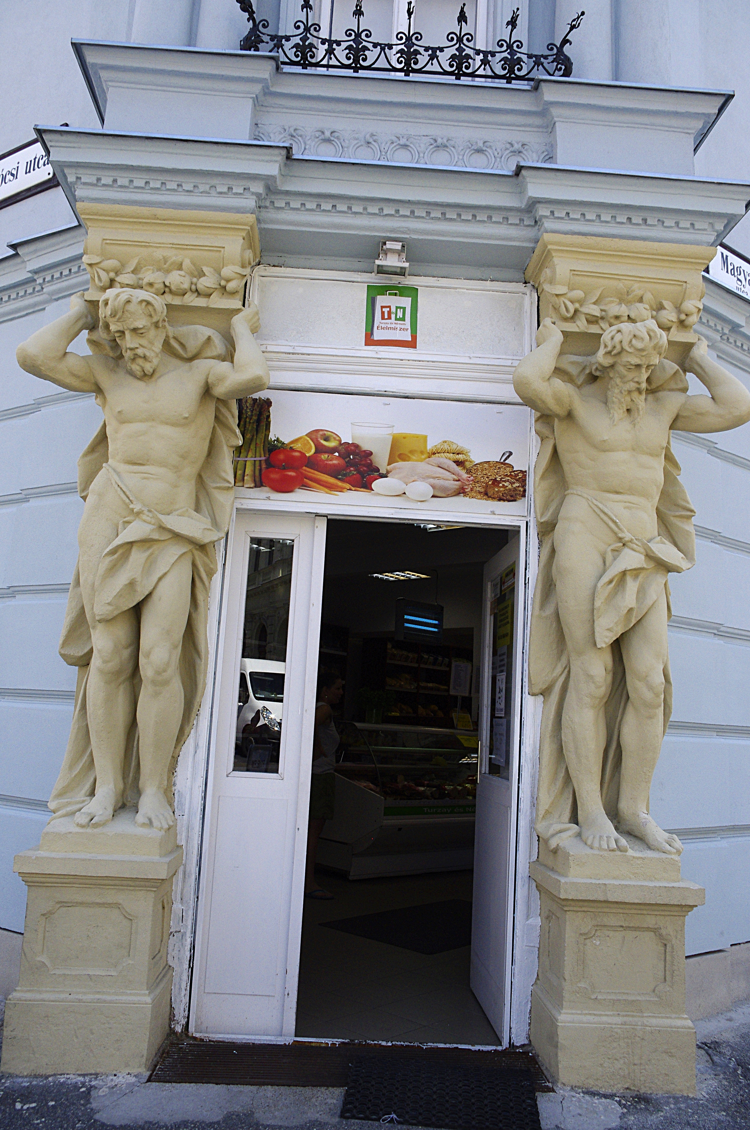 Sopron, Ungarn - Atlanten am Haus Pócsi utca 2, Ecke Magyar utca.